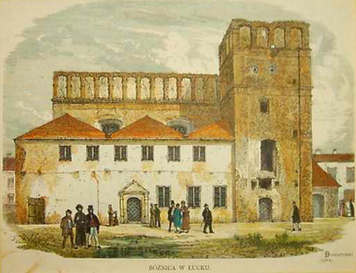 Synagogue in Lutsk